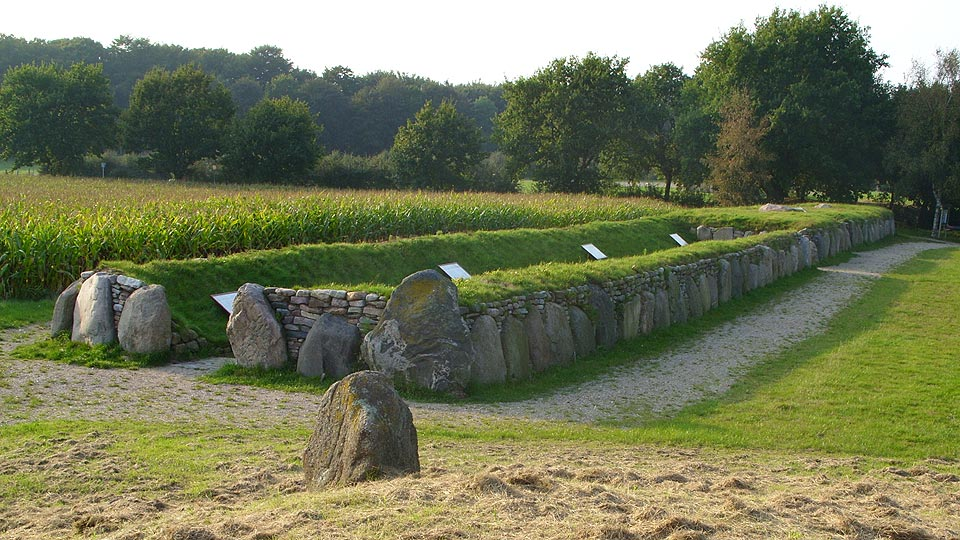 Munkwolstrup Arnkielpark, Langbett LA31